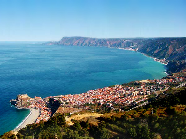 Costa Viola, Reggio Calabria: panorama di Scilla con il Castello Ruffo e della Costa Viola con in lontananza Bagnara Calabra.